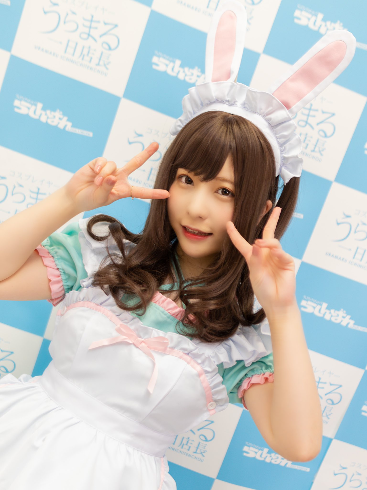 一日店長イベントの撮影会にて撮影